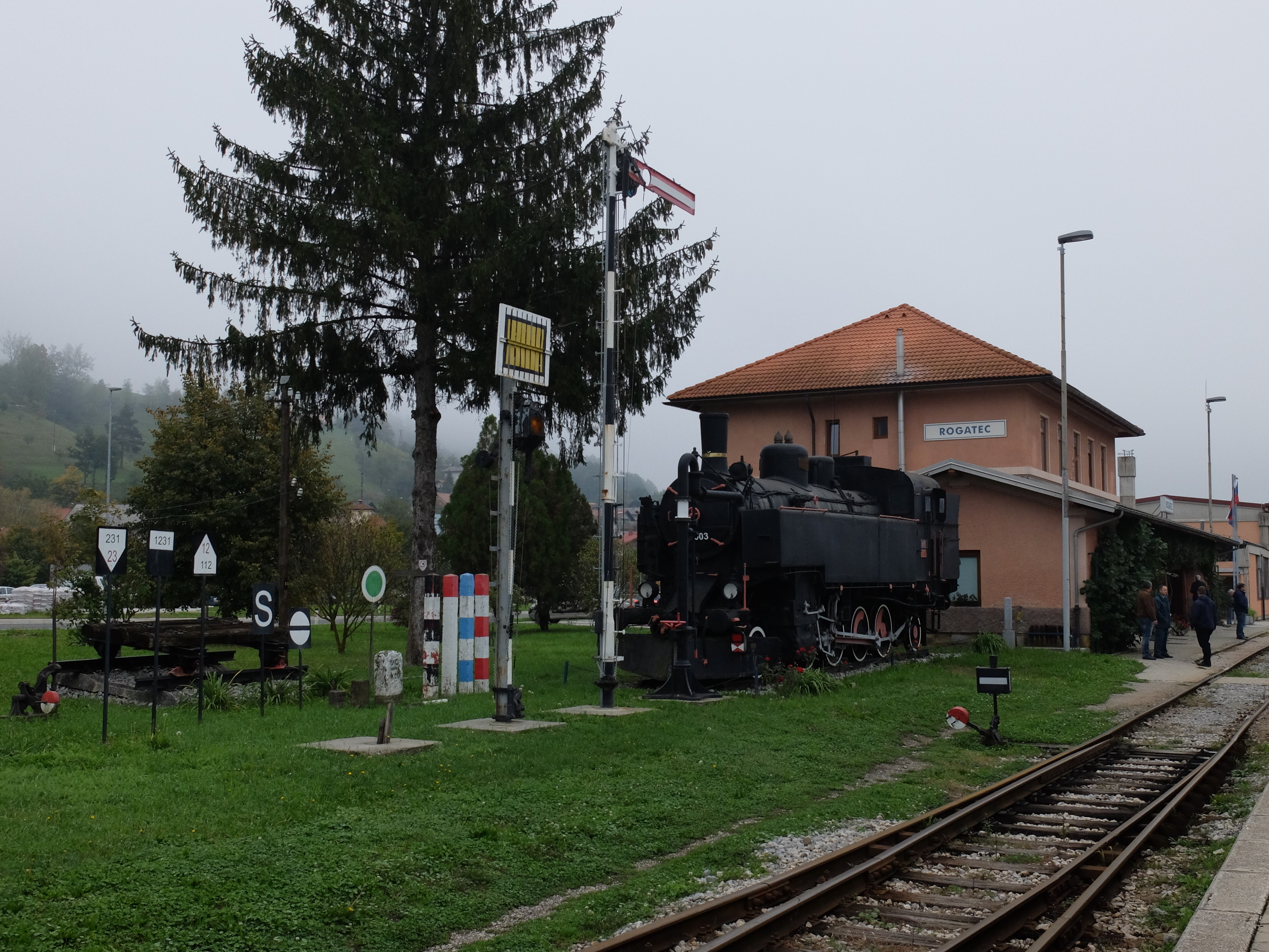 Rogatec (Bahnhof)